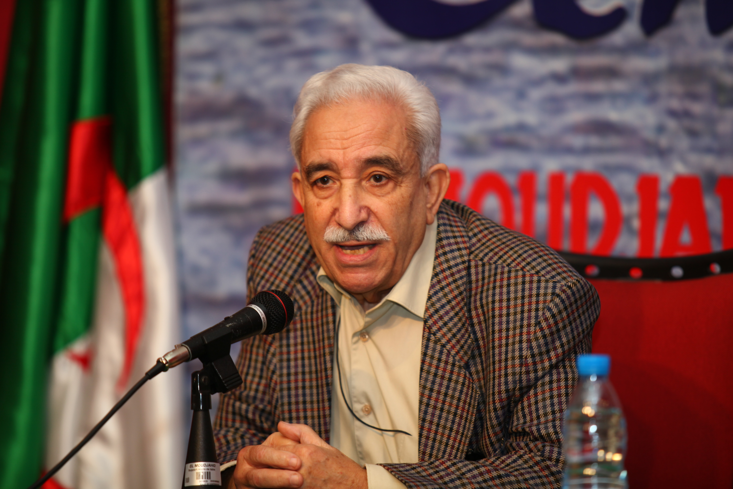 Kaddour M'Hamsadji au forum d'El Moujahid